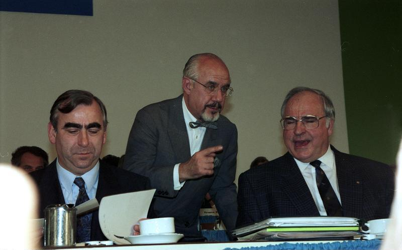 17.-18.11.1989 53. CSU-Parteitag in der Münchener Bayernhalle mit dem CSU-Vorsitzenden, Bundesminister der Finananzen, Dr. Theodor Waigel, dem Bayerischen Ministerpräsident Max Streibel, Bundesminister Hans Klein, und als Gast Bundeskanzler Helmut Kohl.